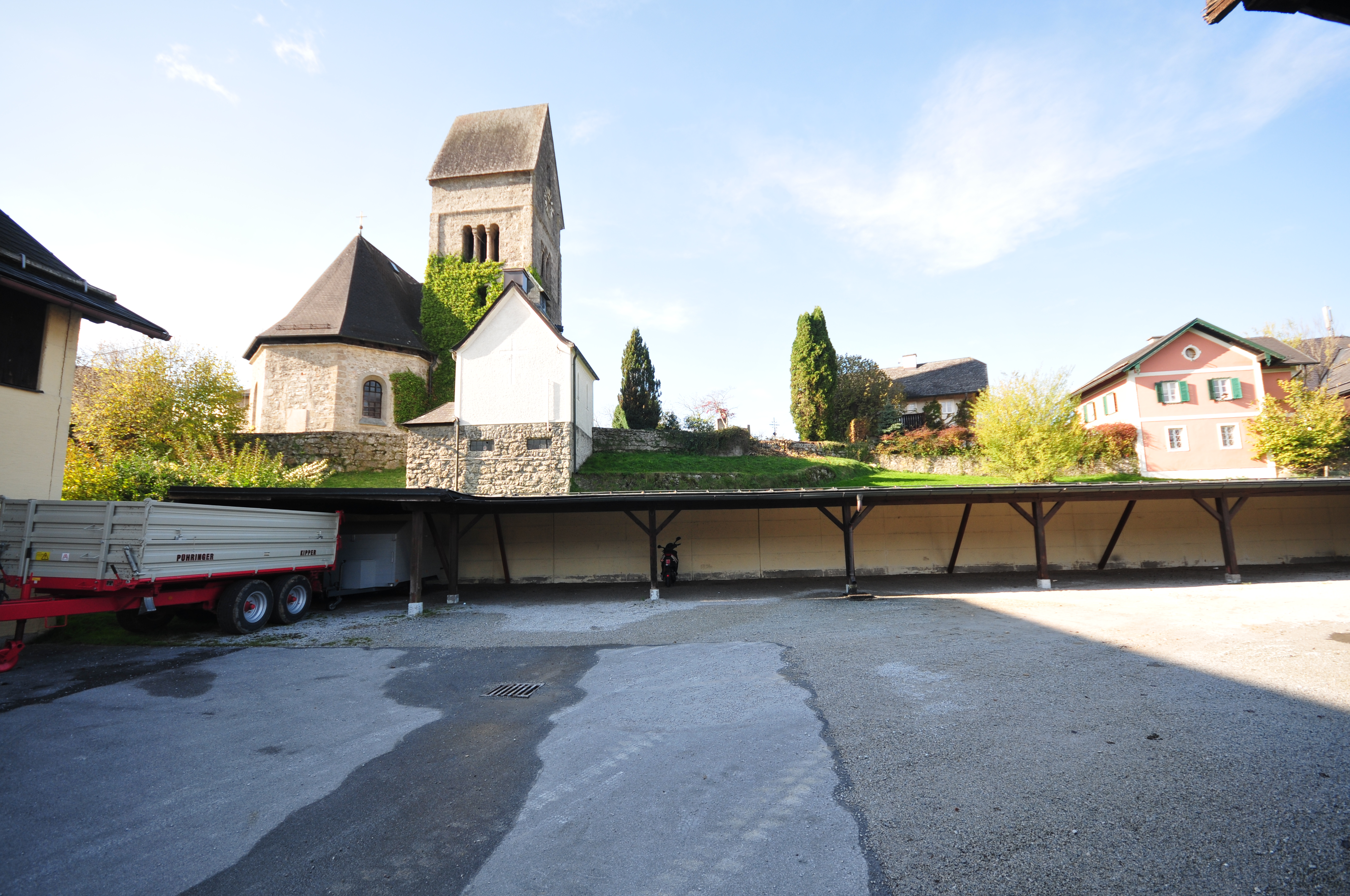 Anif, Salzburg Wikipedia im Landtag – Salzburg 31. Oktober 2012 in SalzburgDieses Foto wurde im Rahmen des Projektes „Wikipedia im Landtag“ erstellt.